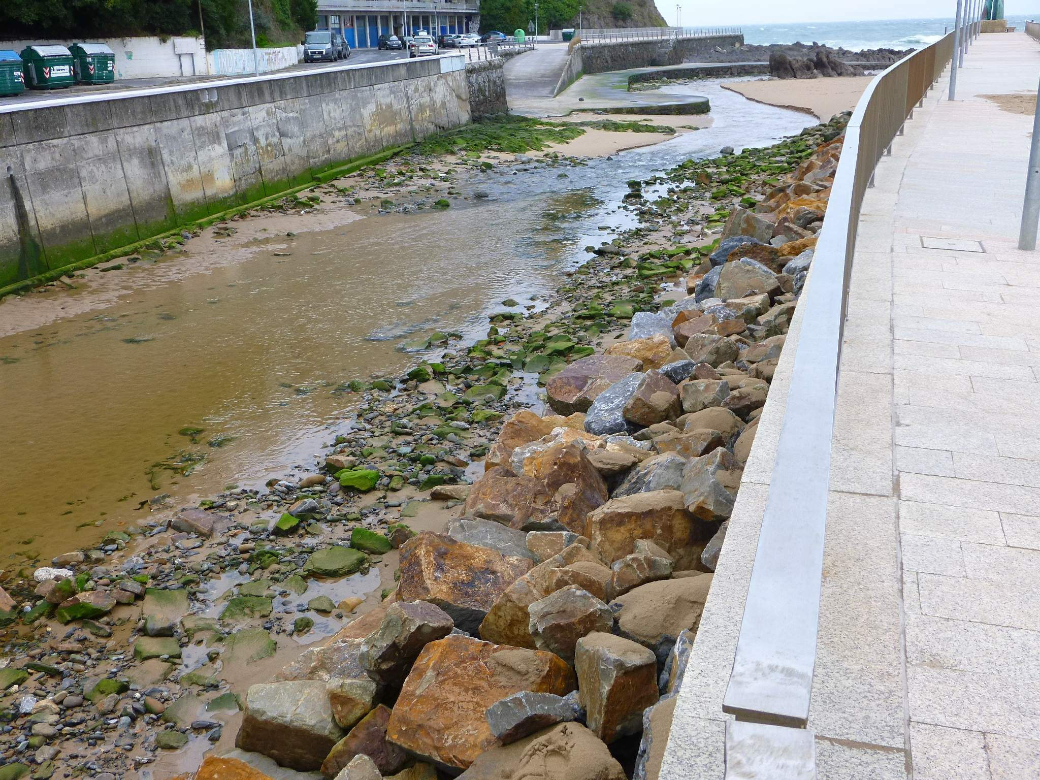 Desembocadura del río Zarraga en Bakio (Bizkaia)